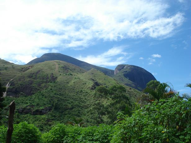 Esta é a Pedra do Elefante. Uma das montanhas mais conhecidas de Petrópolis-RJ. Foi decretada como Monumento Natural Pedra do Elefante. Localiza-se no Vale do Taquaril.